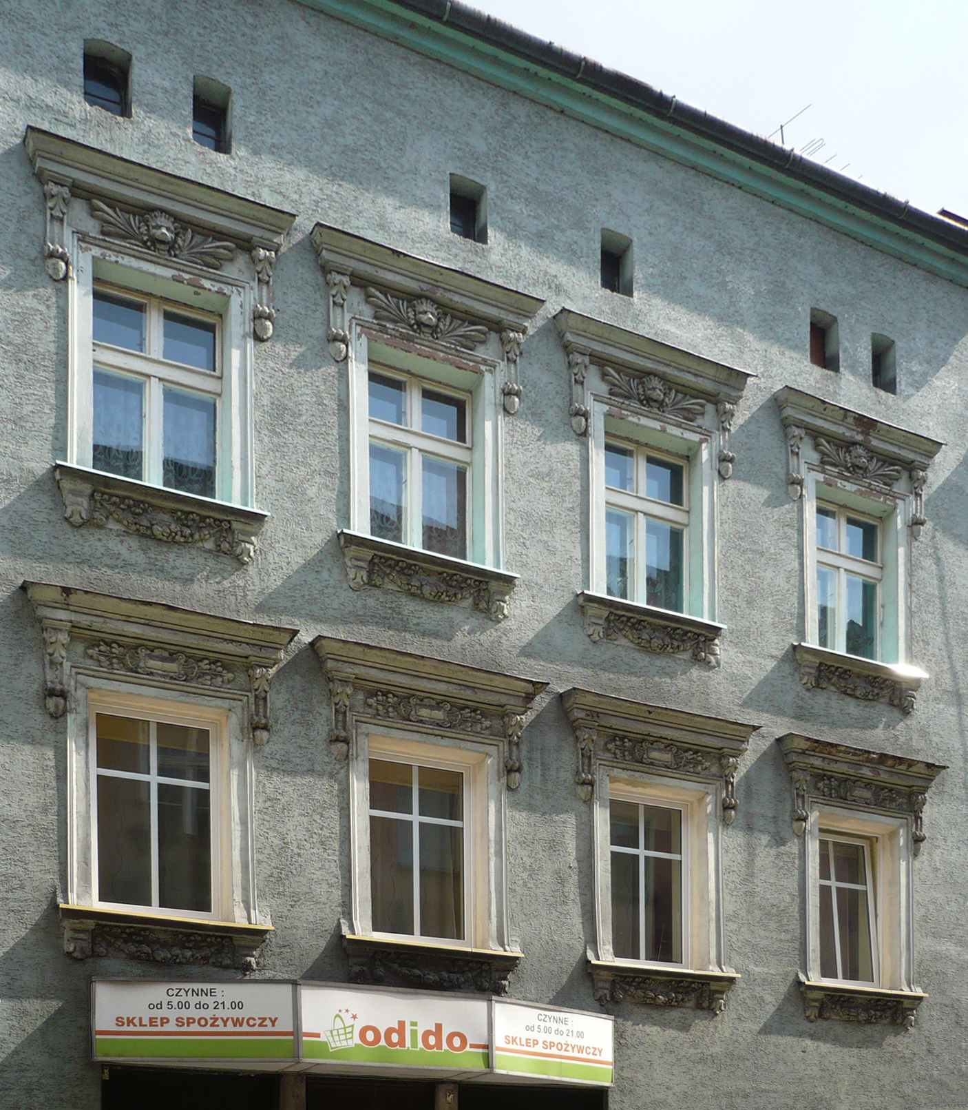 Nowa Ruda, ul. Piastów 19 - dom z XVI w., 1890